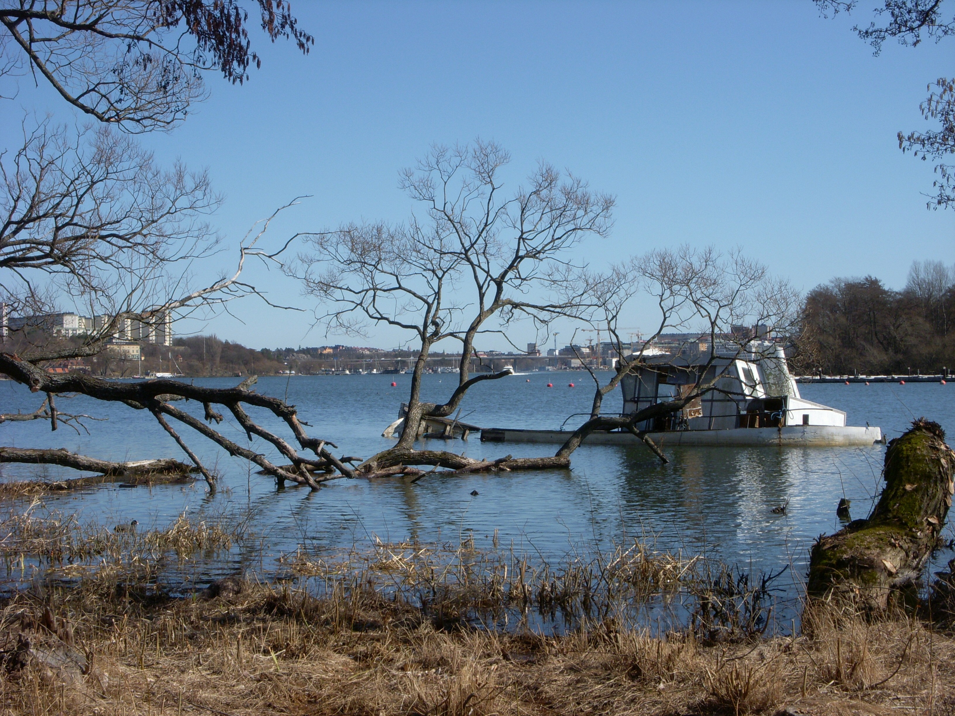 Ulvsundasjön på våren 2001